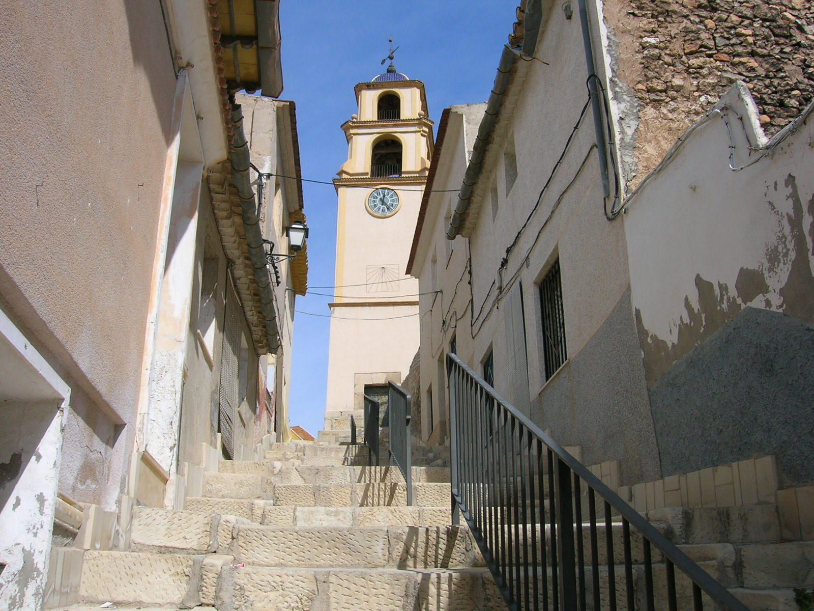 Torre del Reloj de Monovar